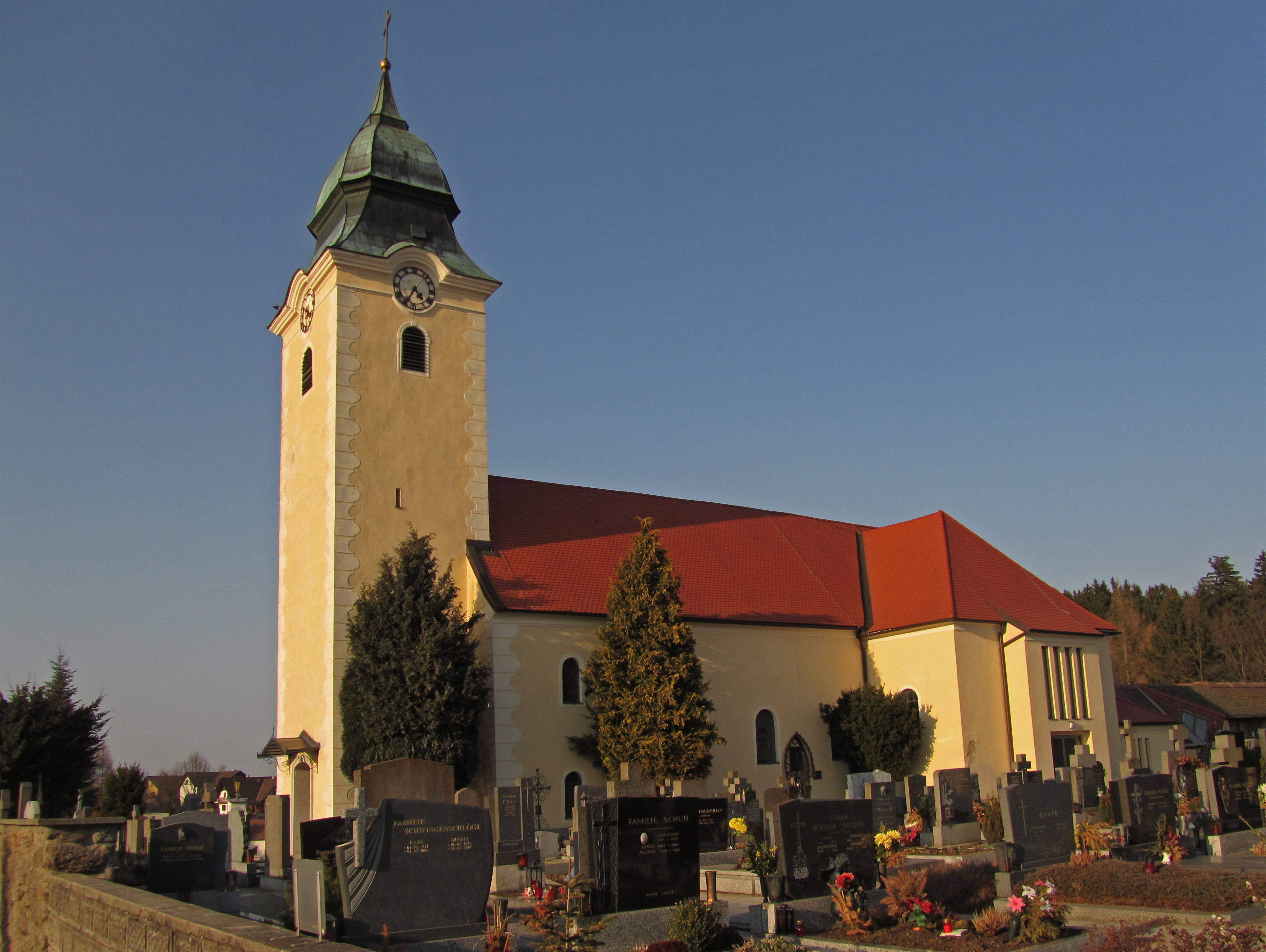 Kath. Pfarrkirche hl. Michael